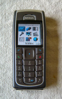 Nokia 6230